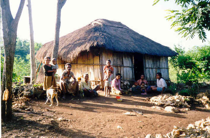 Atoin Meto-Haushalt, Tetaf, Amanuban Barat